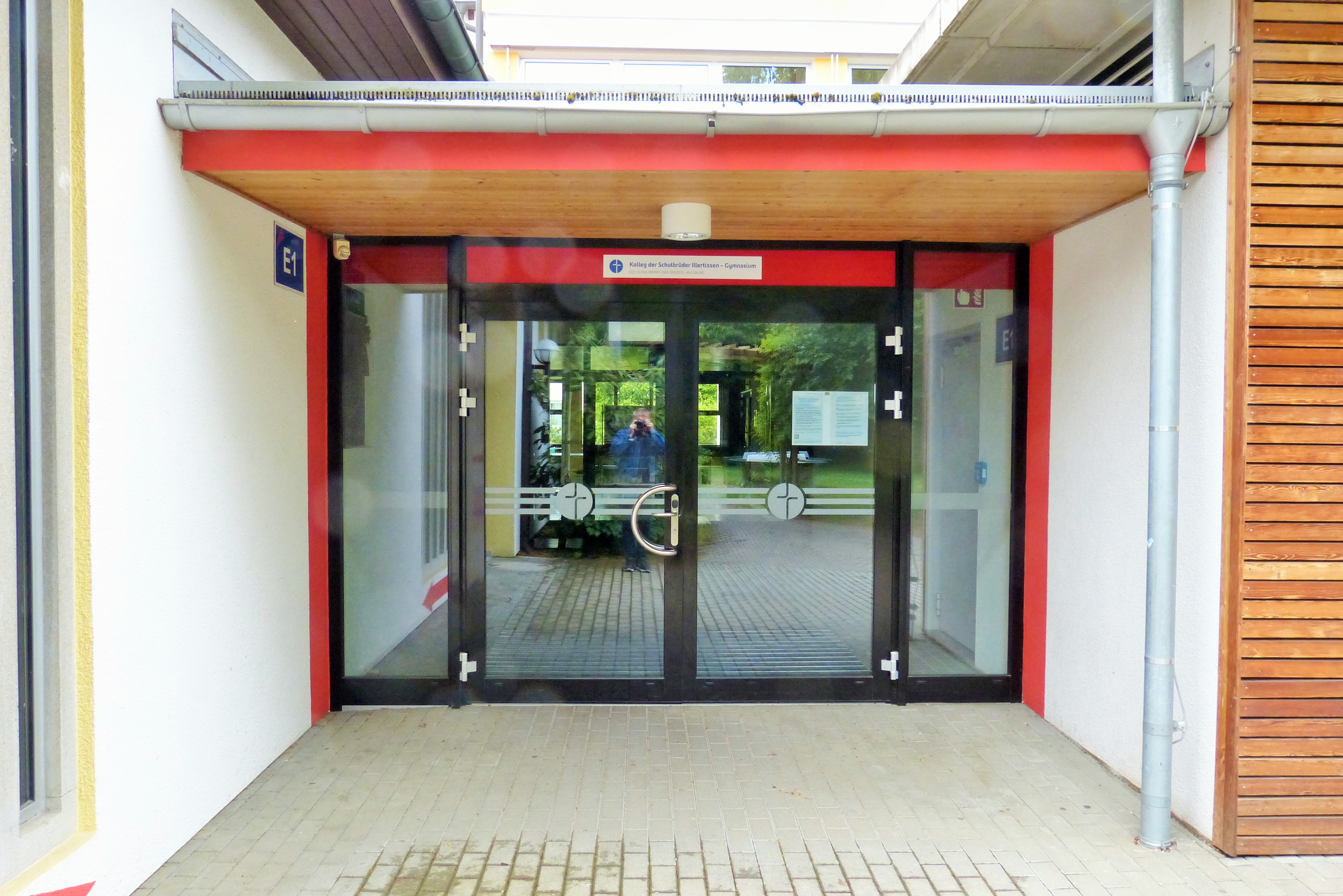 Kolleg der Schulbrüder Illertissen, 2020